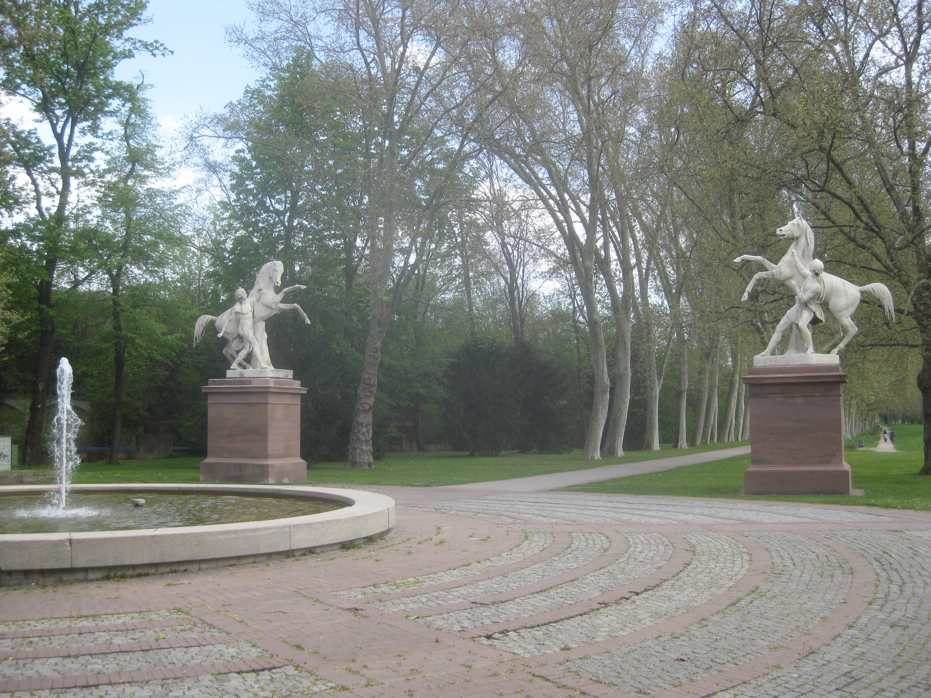 Ludwig Hofer: Die Rossbändiger, Weißer Marmor, nicht vermessen, 1842-1849, Stuttgart, Unterer Schlossgarten, am Eingang der Platanenallee, 2012.